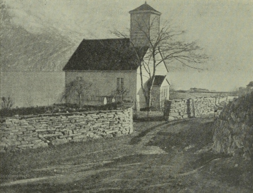 Nes kirke i Luster, oppført 1835, før en ombygging i 1909. Fra Jon Laberg: «Luster: Bygd og ætter» (Bergen, 1926).